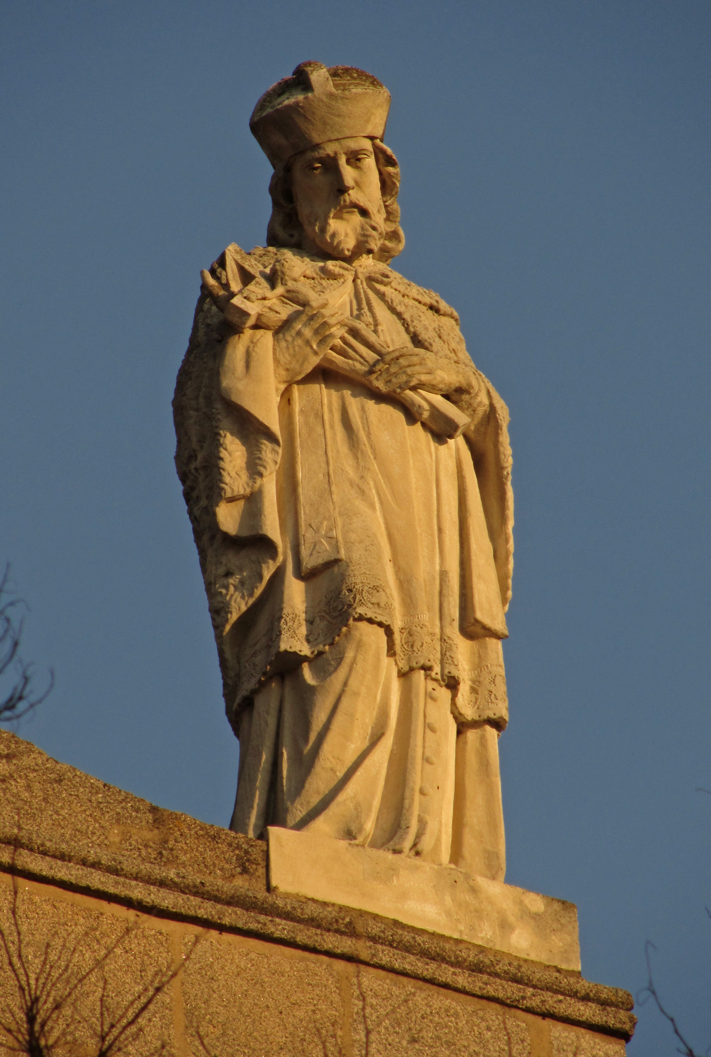 Johannes Nepomuk als Giebelfigur an der Westfassade der Pfarr- und Wallfahrtskirche von Hoheneich